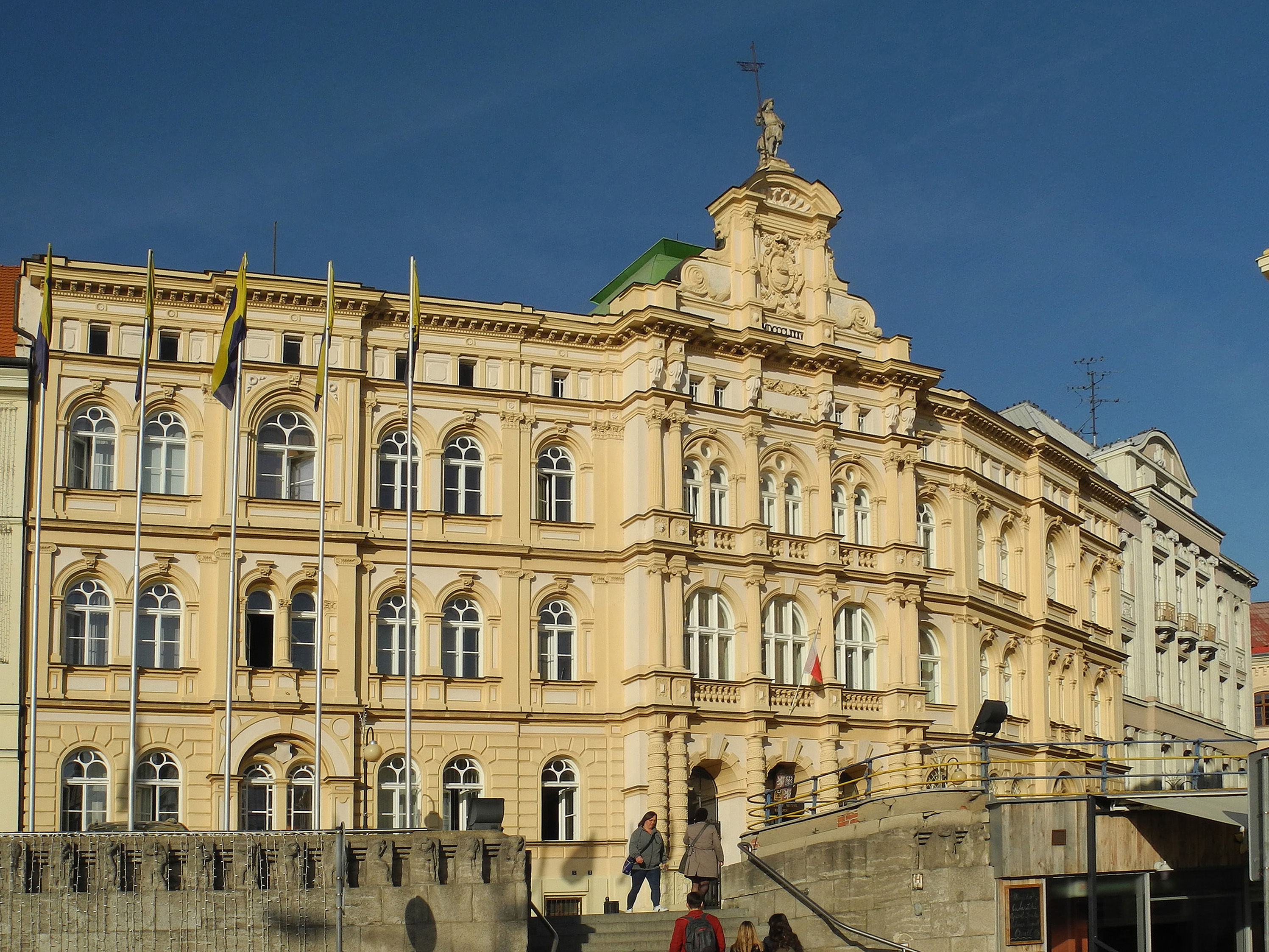 Neues Rathaus in Teplice, náměstí Svobody 2/2 (früher Teplitz, Marktplatz)